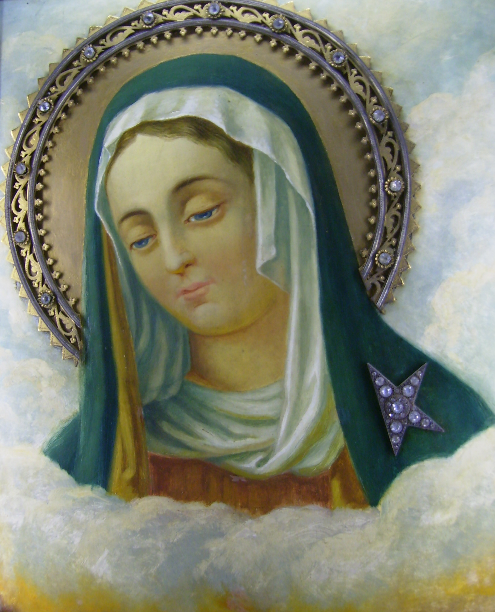 Icône Notre Dame de Grâce Berzée